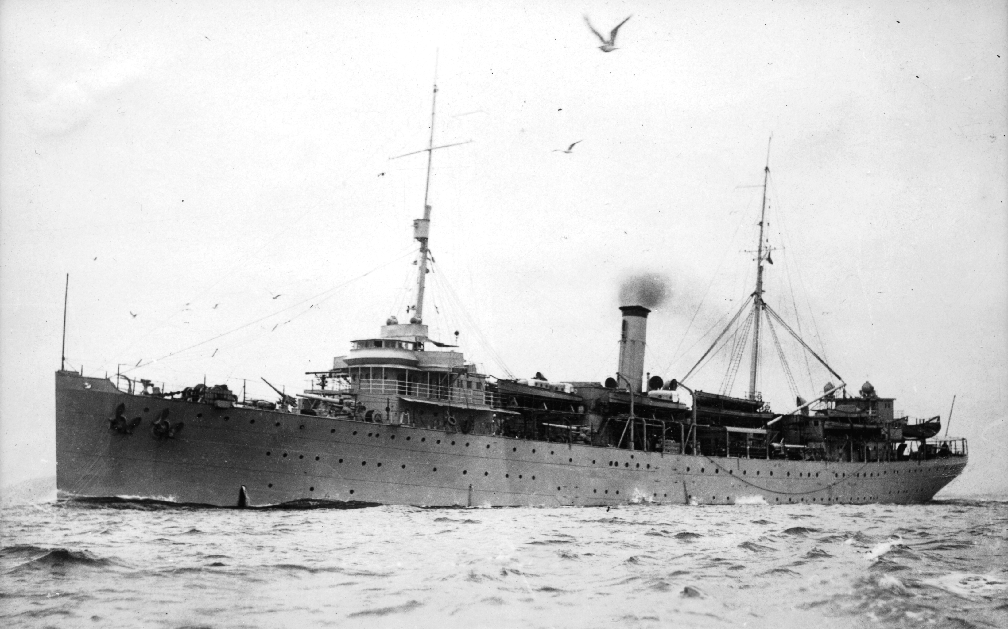 The U.S. Navy destroyer tender USS Melville (AD-2) underway in 1929.